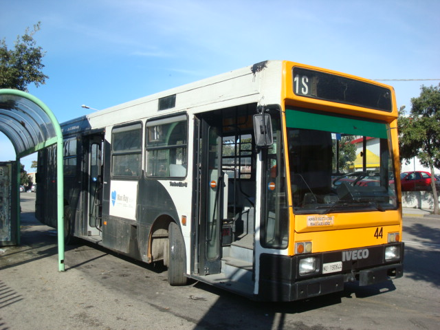 Bus della linea urbana 1S a Nuoro.